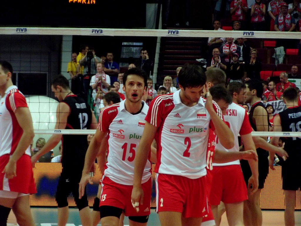 Zdjęcie zrobione podczas zawodów Ligi Światowej 2012 w katowickim Spodku.